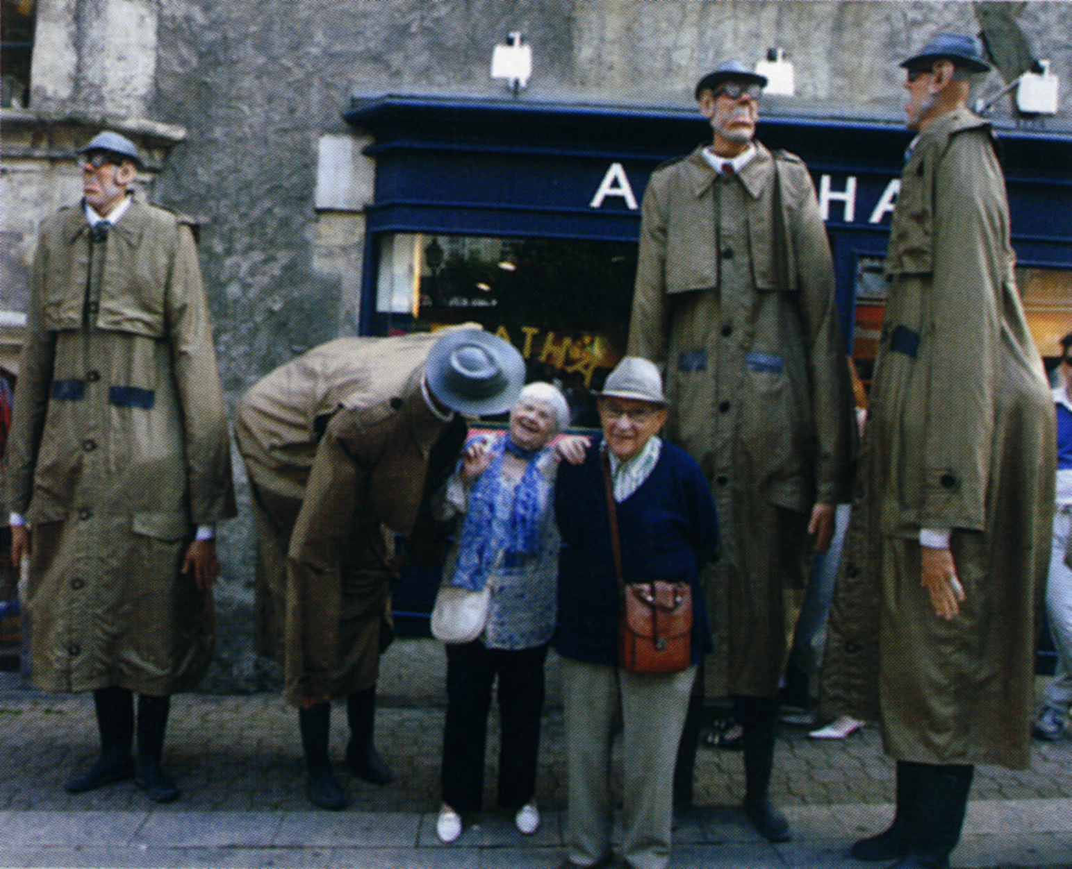 Spectacle de rue les Z'accros à Nevers (58). Cliché publiable moyennant mention du crédit de la Ville de Nevers. Les Bigbrozeurs de la Compagnie Albedo (déambulatoire de marionnettes)